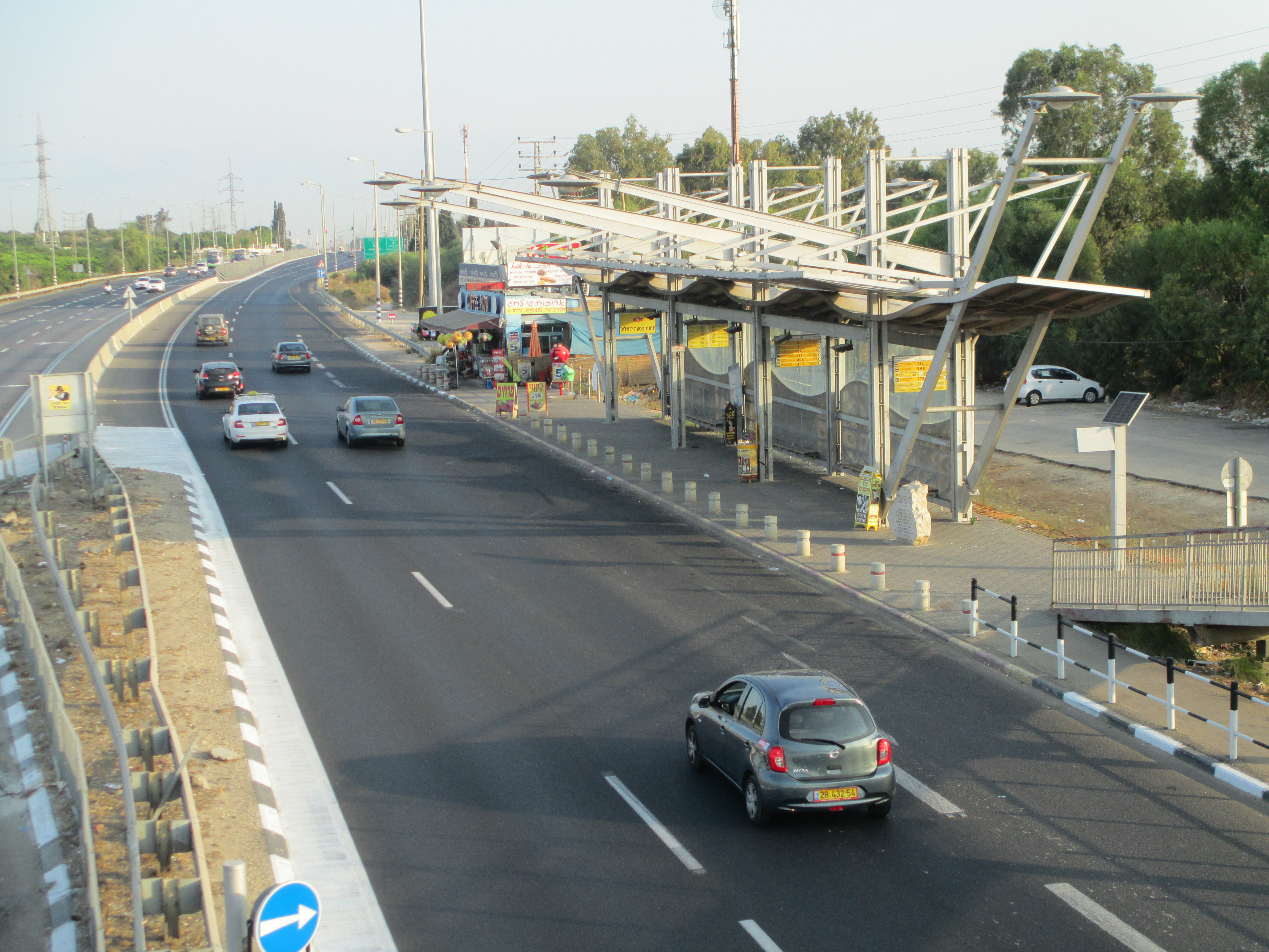 הטרמפיאדה בצומת צריפין בה נרצחו 9 חיילים בפיגוע התאבדות ב-2003